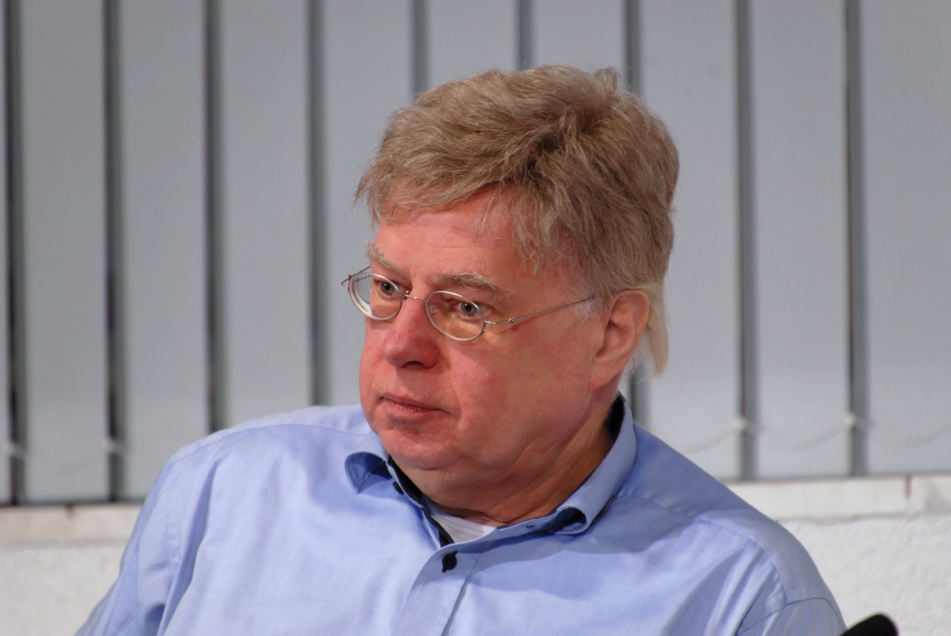 Michael Rische in der Zentralbibliothek in Düsseldorf